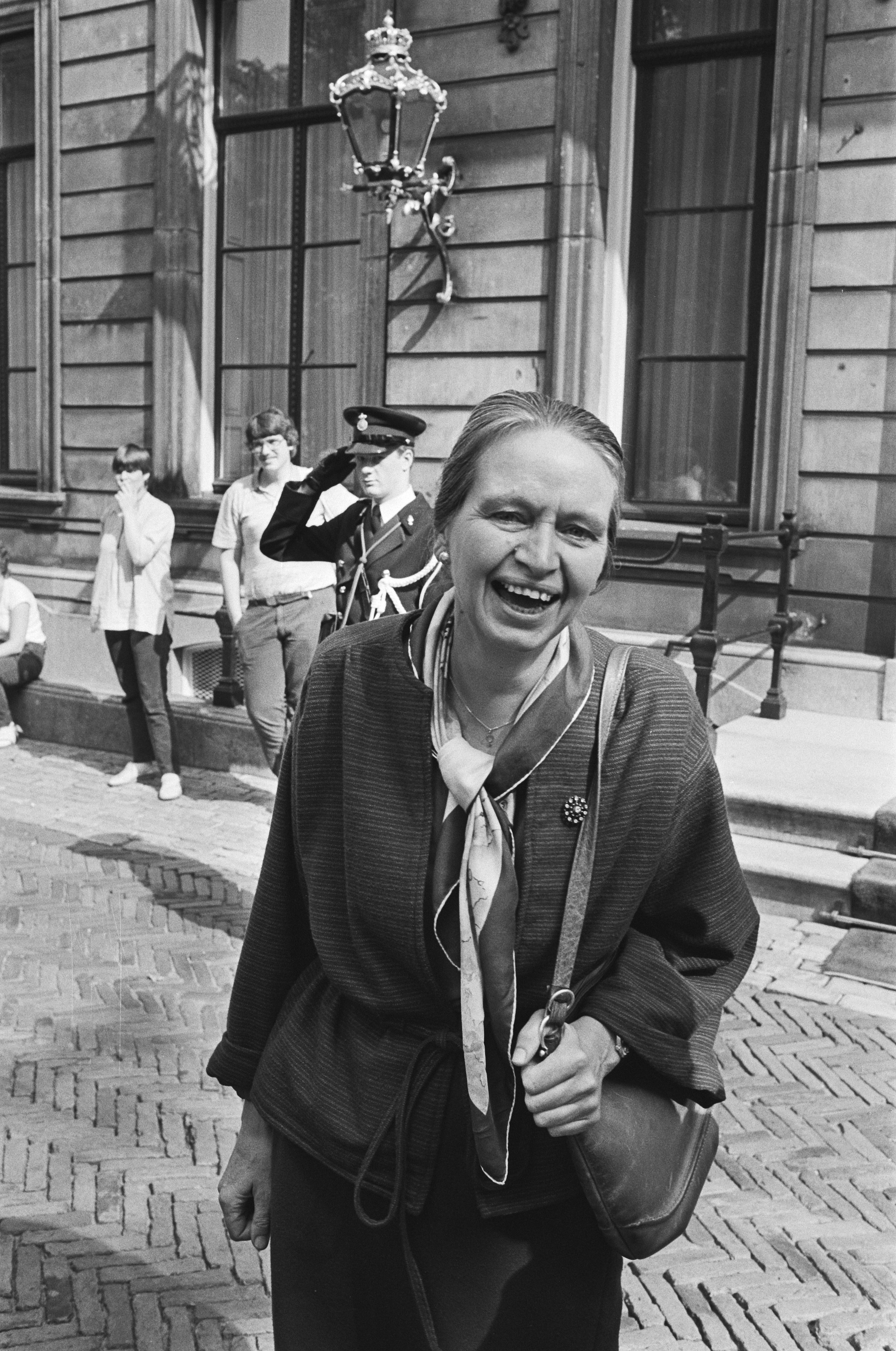 Collectie / Archief : Fotocollectie Anefo Reportage / Serie : Koningin Beatrix ontvangt de fractievoorzitters van de kleine partijen vanwege de kabinetsformatie Beschrijving : Cathy Ubels (EVP) Datum : 10 september 1982 Locatie : Den Haag, Zuid-Holland Trefwoorden : kabinetsformaties, politiek, portretten Persoonsnaam : Ubels, Cathy Fotograaf : Antonisse, Marcel / Anefo Auteursrechthebbende : Nationaal Archief Materiaalsoort : Negatief (zwart/wit) Nummer archiefinventaris : bekijk toegang 2.24.01.05 Bestanddeelnummer : 932-3197